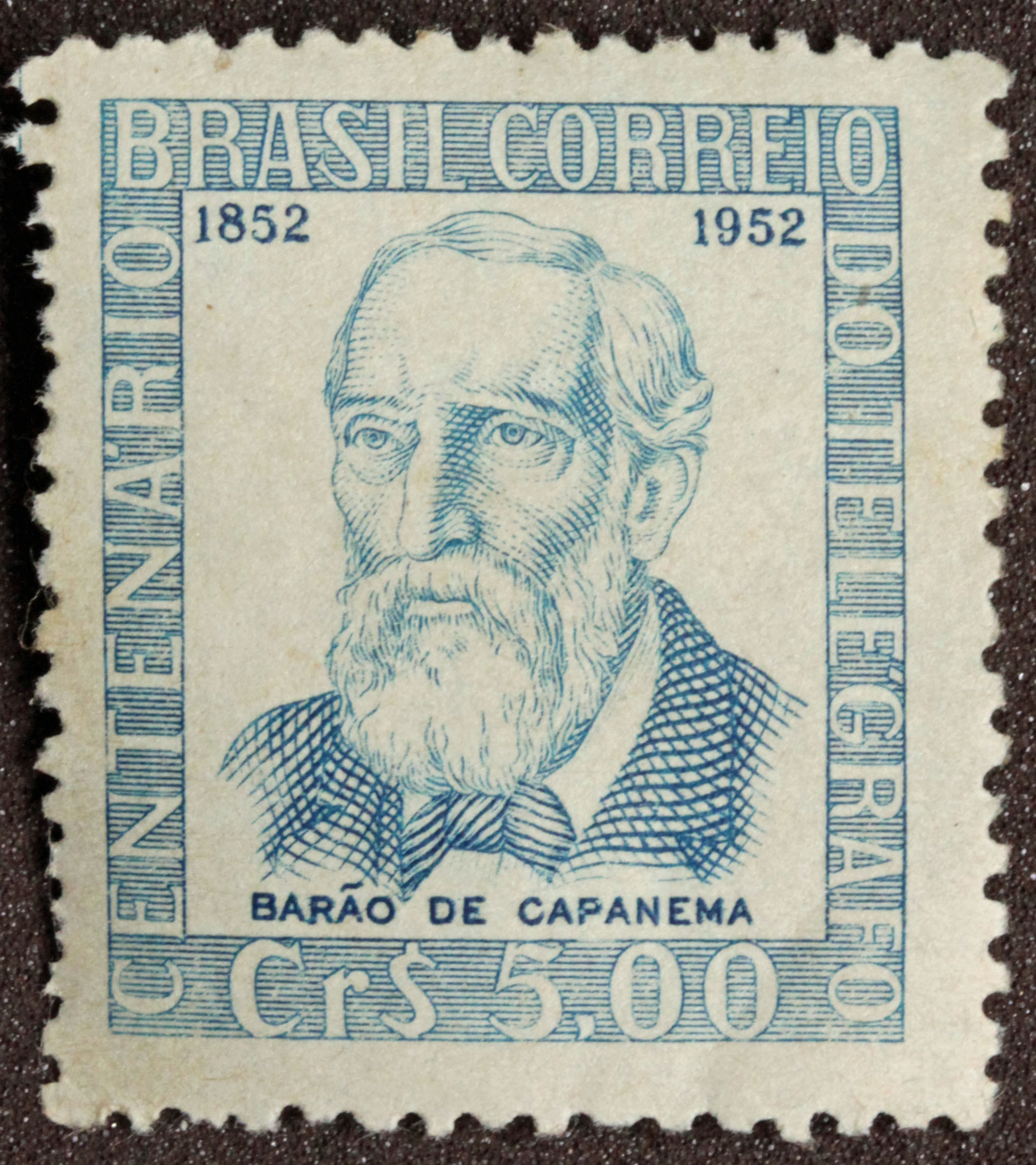 Selo comemorativo do Centenário do Telégrafo: 1852-1952. Barão de Capanema. Valor Cr$ 5,00